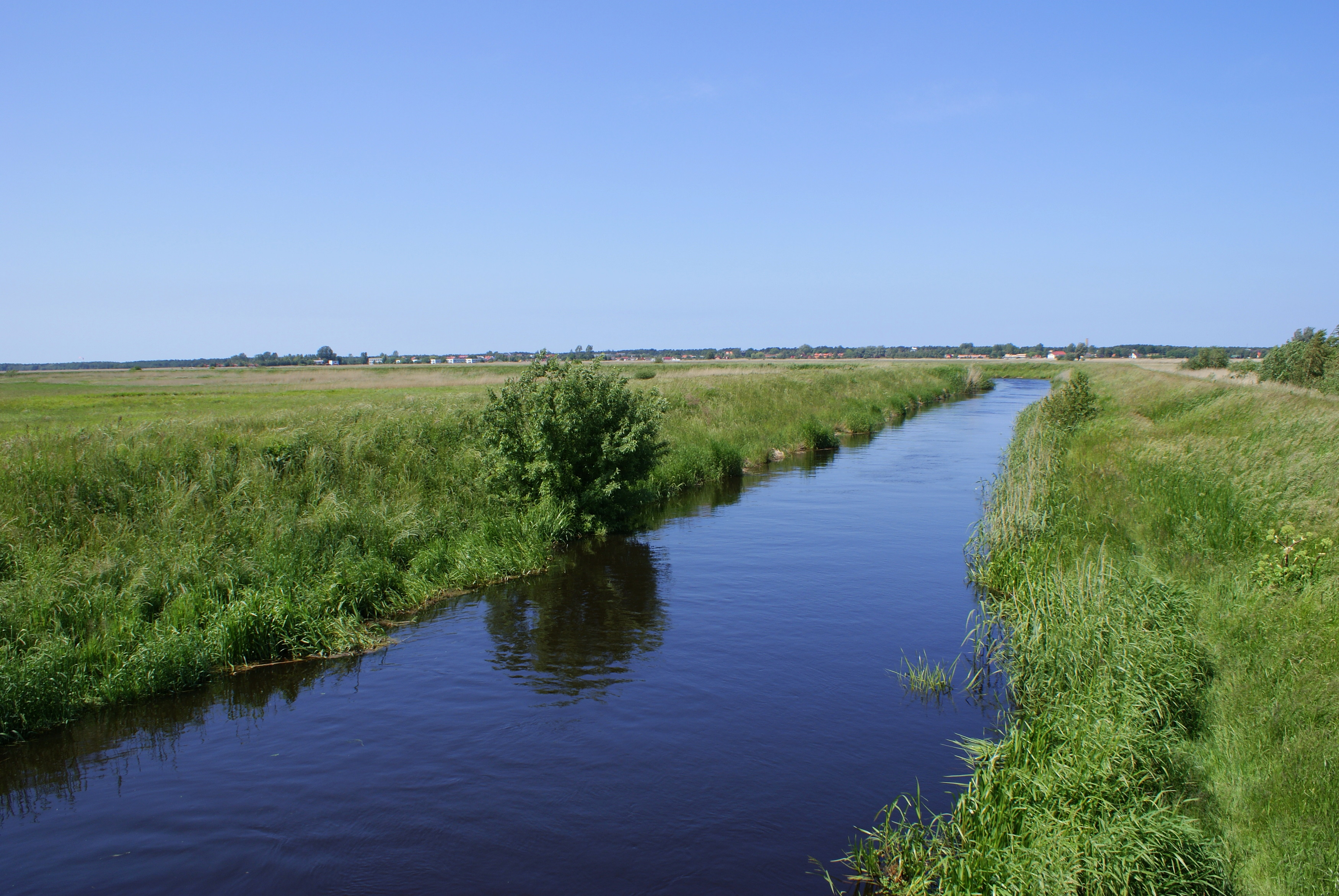 Nowa Błotnica (Bagienny Rów) z mostu na północ od Karcina - ujęcie na północ